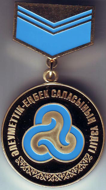 Нагрудный знак "отличник социально-трудовой сферы"